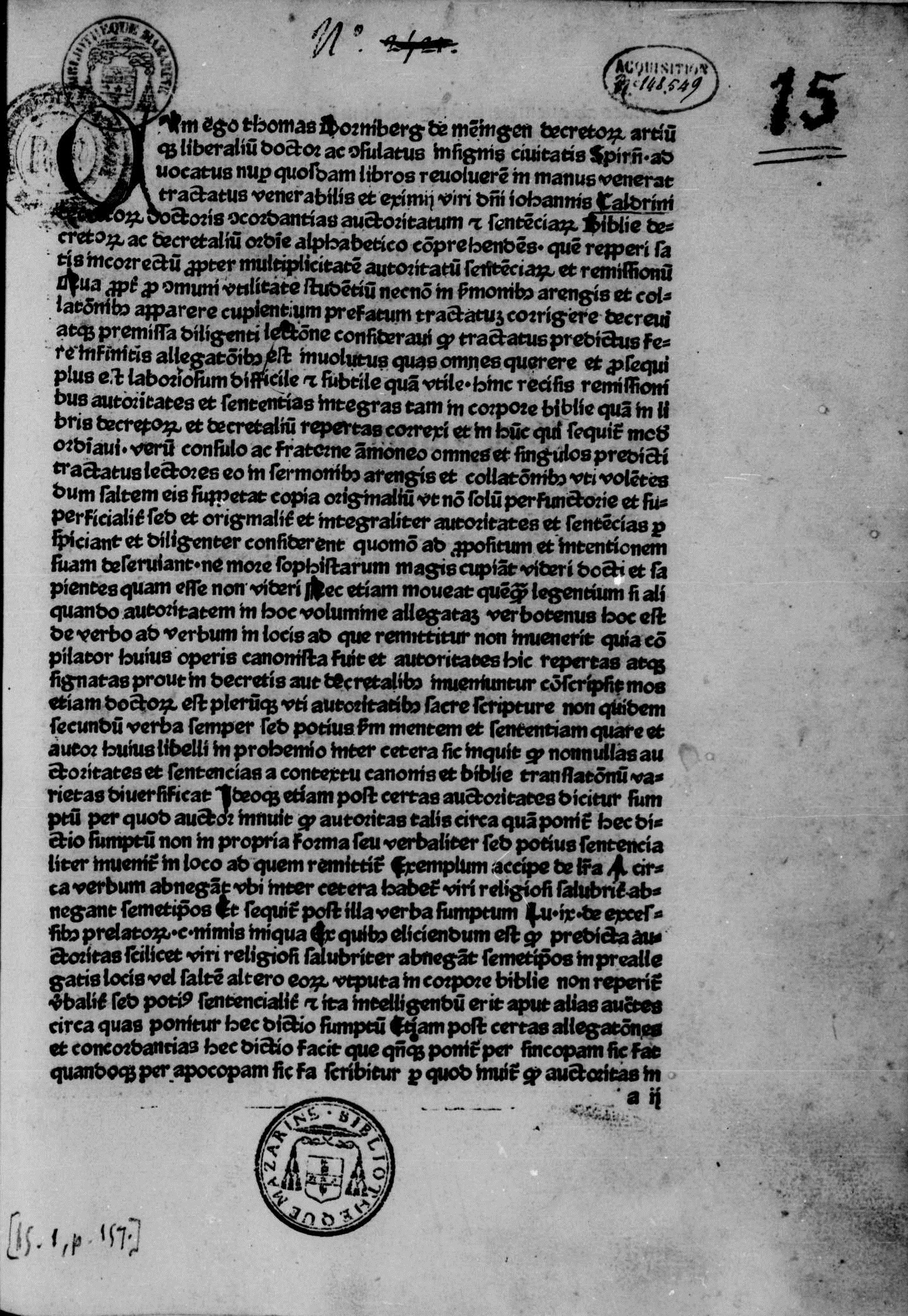 Carta a2r